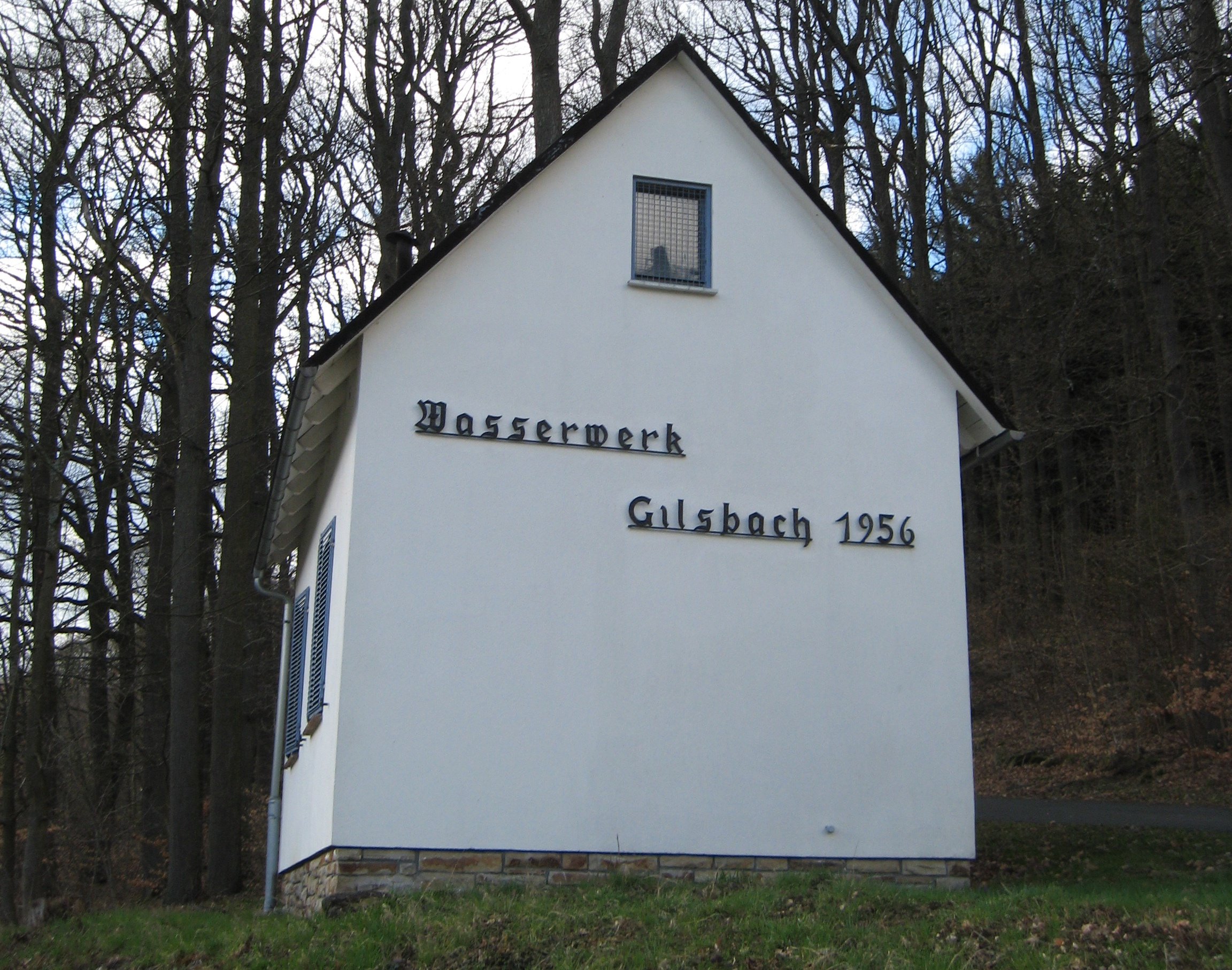 Das 1956 erbaute Wasserwerk in Gilsbach.